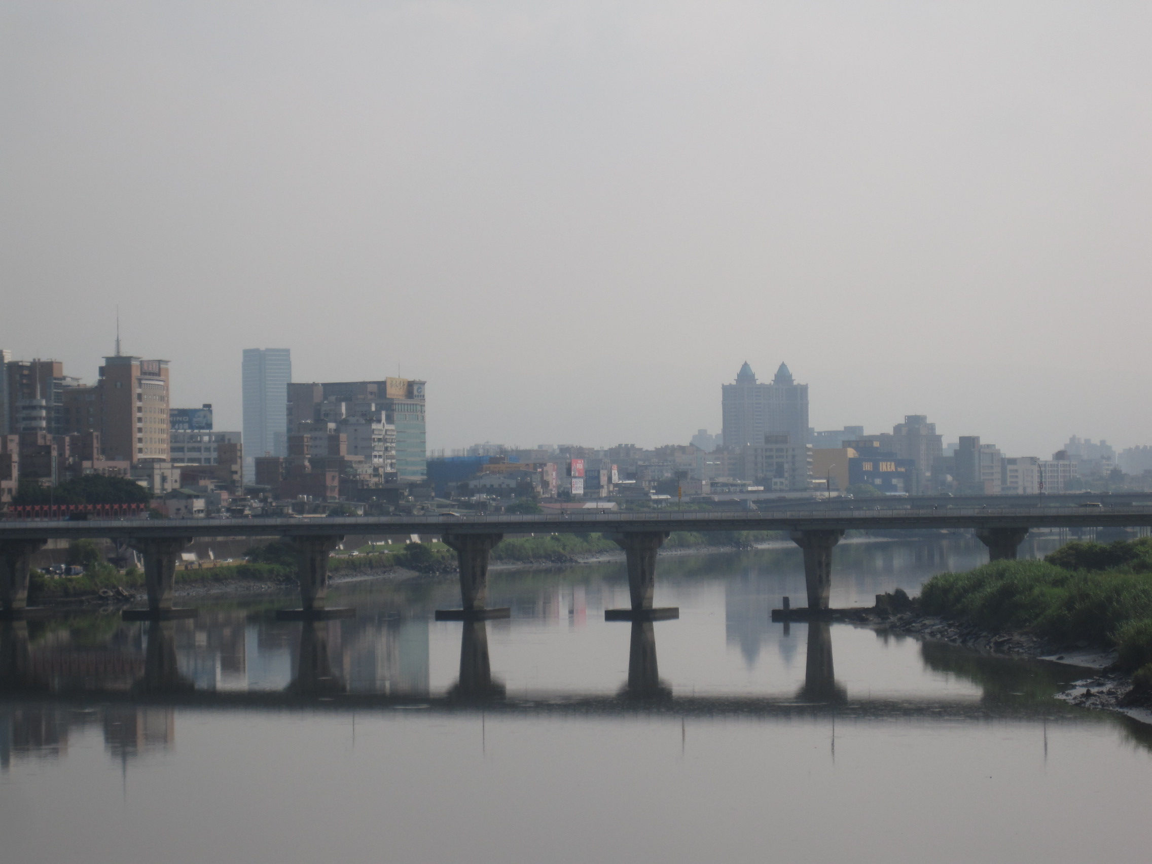 從新月橋上拍攝的新海大橋